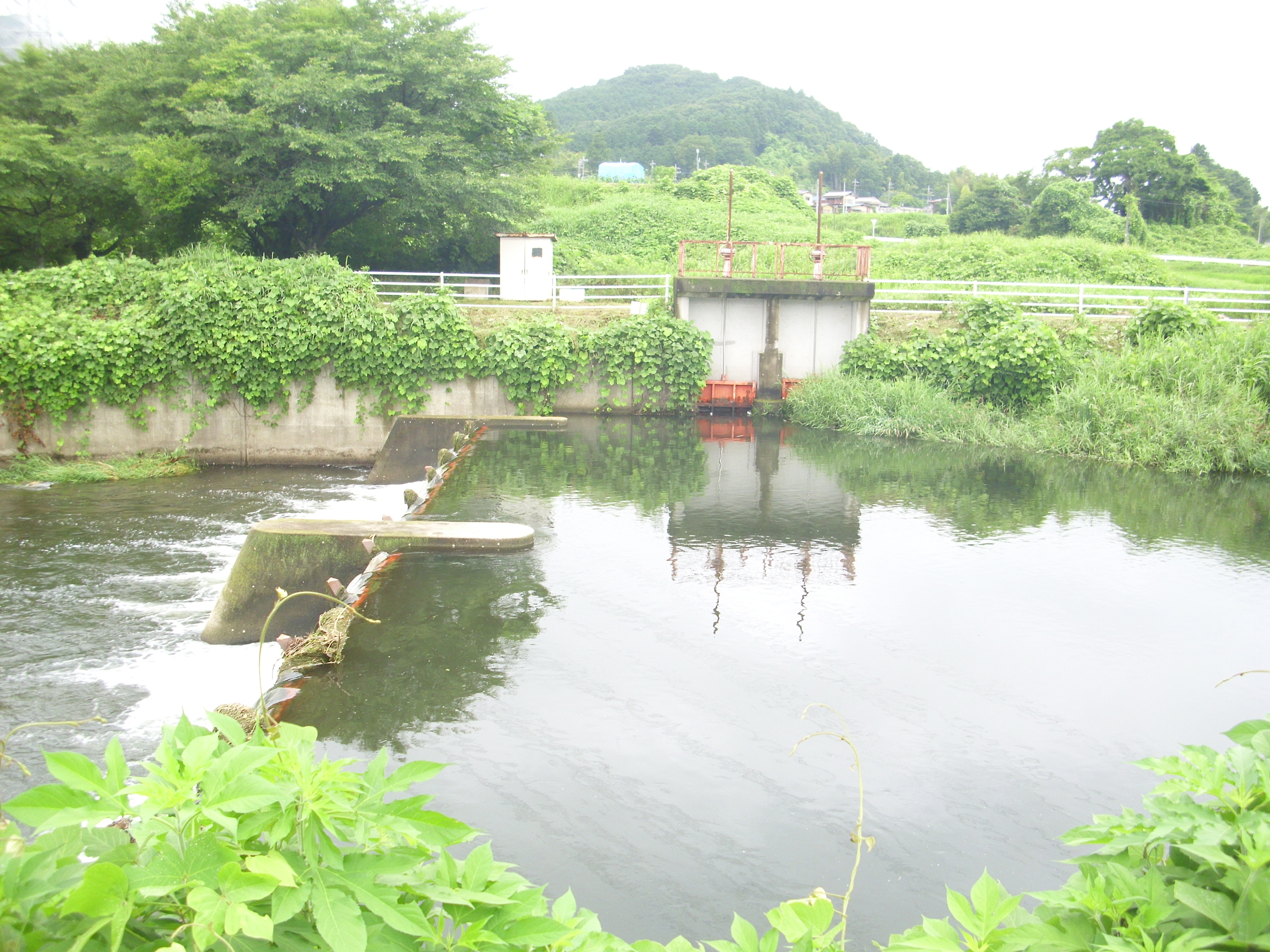 栃木県宇都宮市を流れる新川。二宮尊徳によって造られたことから二宮用水の総称もある。 田川に設けられた堰と取水口。